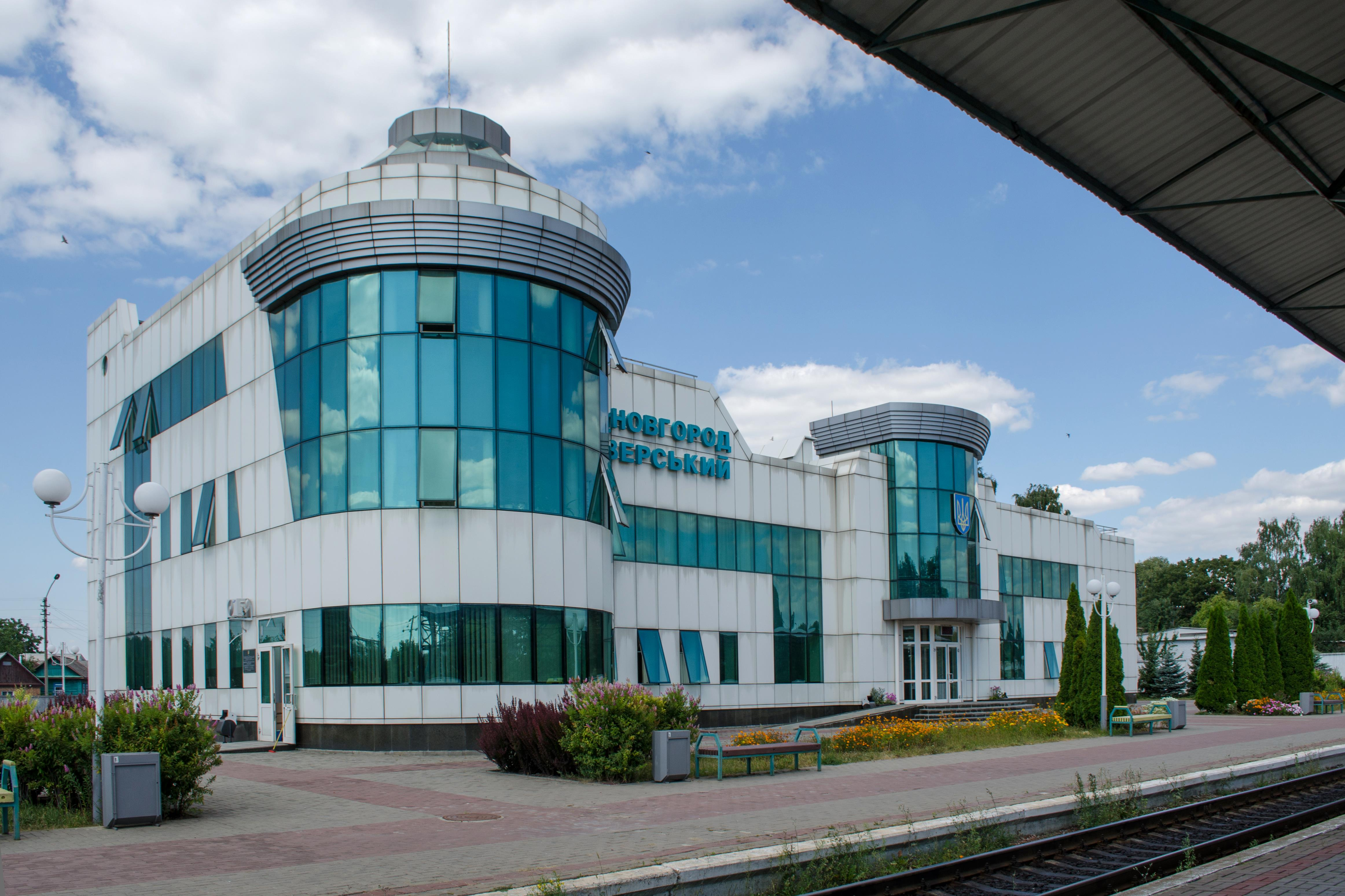 Новгород-Сіверський залізничний вокзал